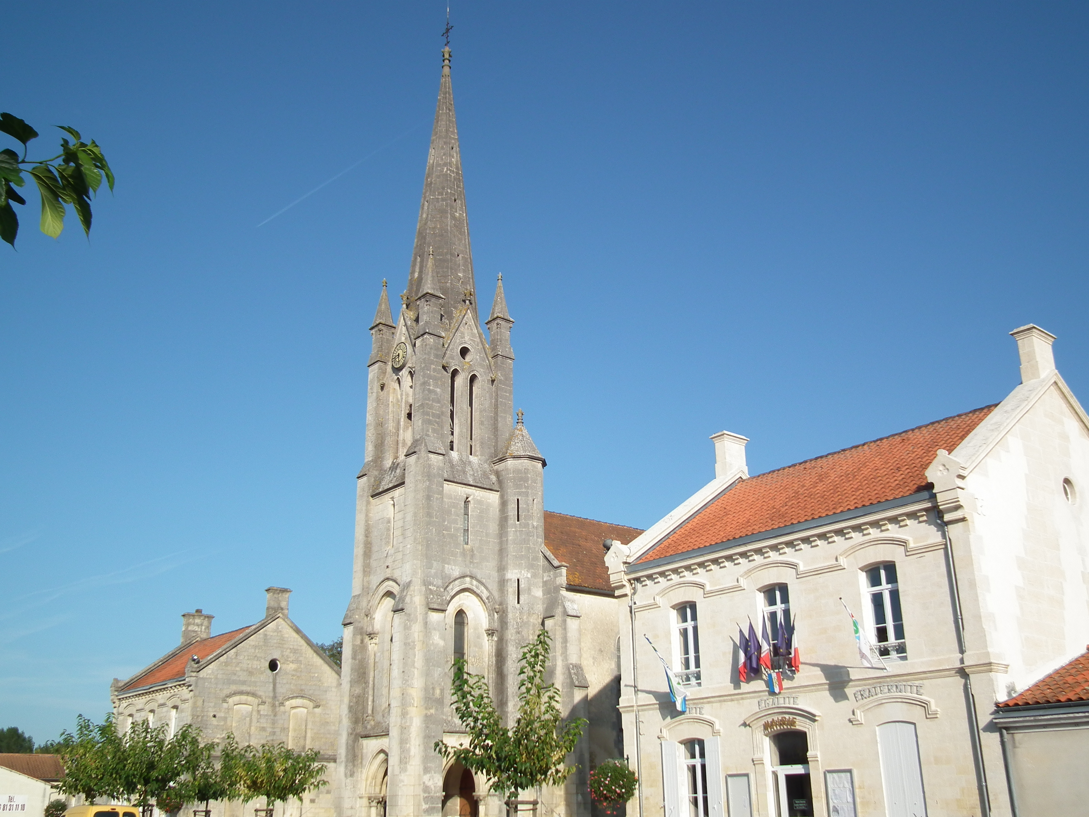 L'église et la mairie de Saint-Genis-de-Saintonge